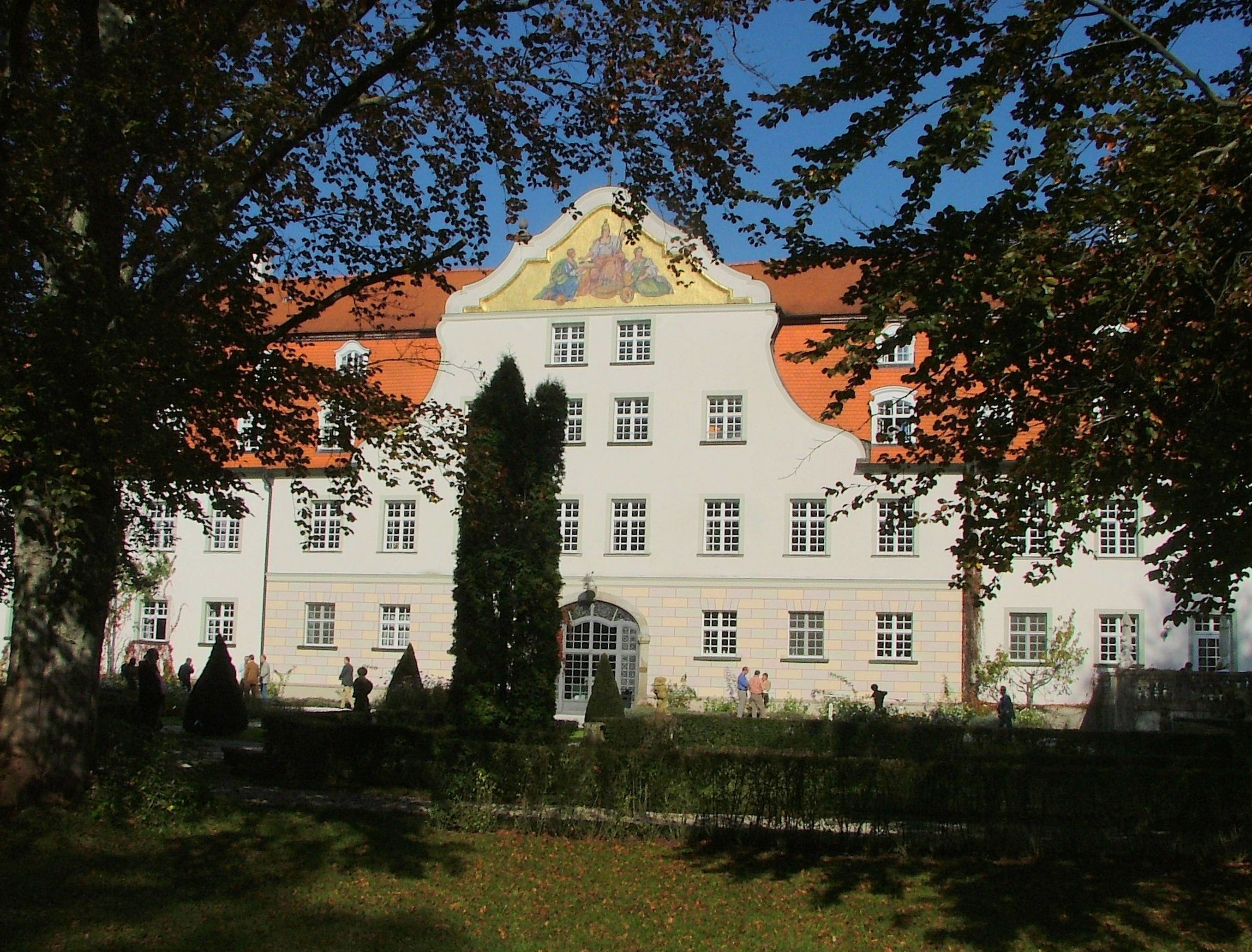 Lautrach